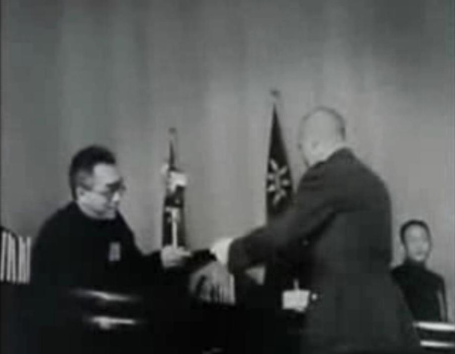 1946年11月28日上午，蒋中正将政治协商会议宪法草案提交制宪国民大会轮值主席胡适。